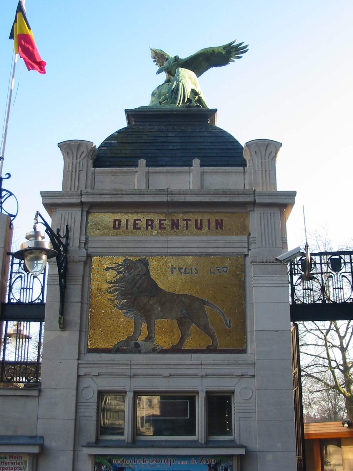 Belgium, Antwerp Zoo, Entrance Gate